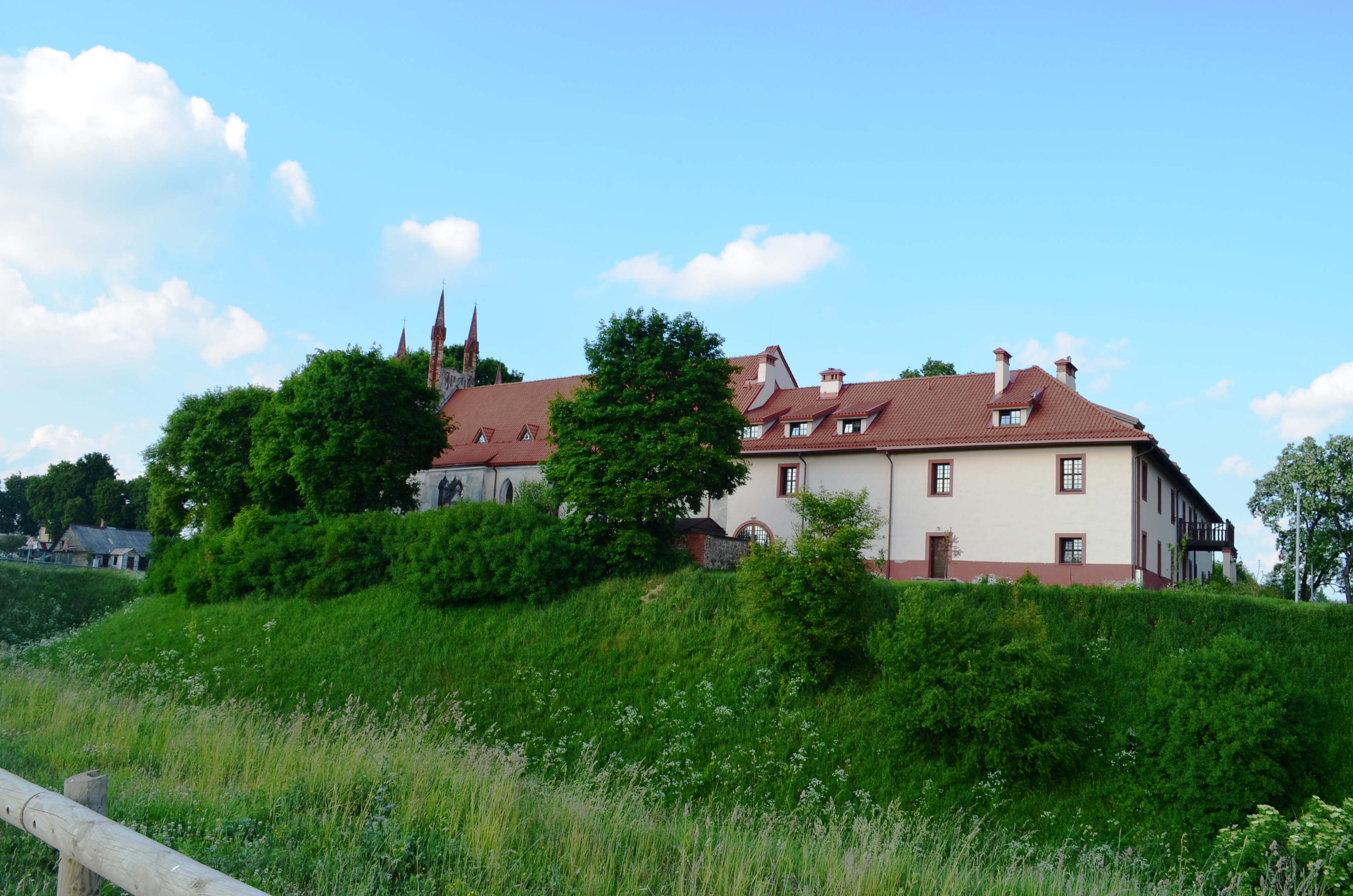 Vienuolynas ir bažnyčia, Sen. Trakai, Trakų raj.